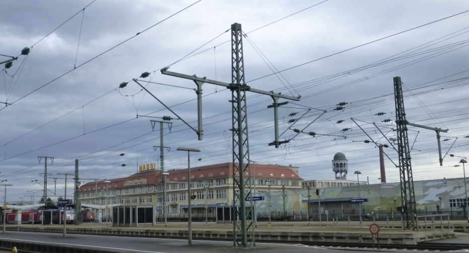 Singen als Stadt kam zustande durch den Eisenbahnbau und die Ansiedlung Schweizer Industriebetriebe.